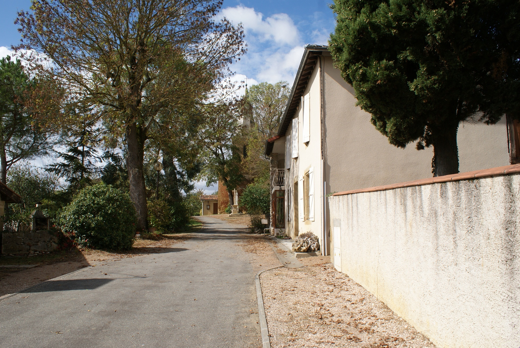 Hoofdstraat in Monties (Gers, Frankrijk).